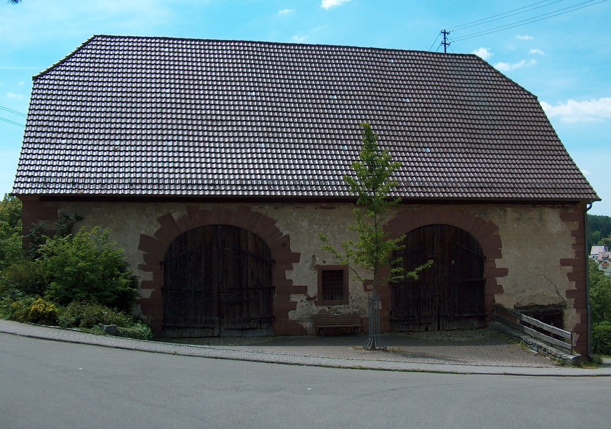 Zéentscheier en Schafhàuse (Weil der Stadt)